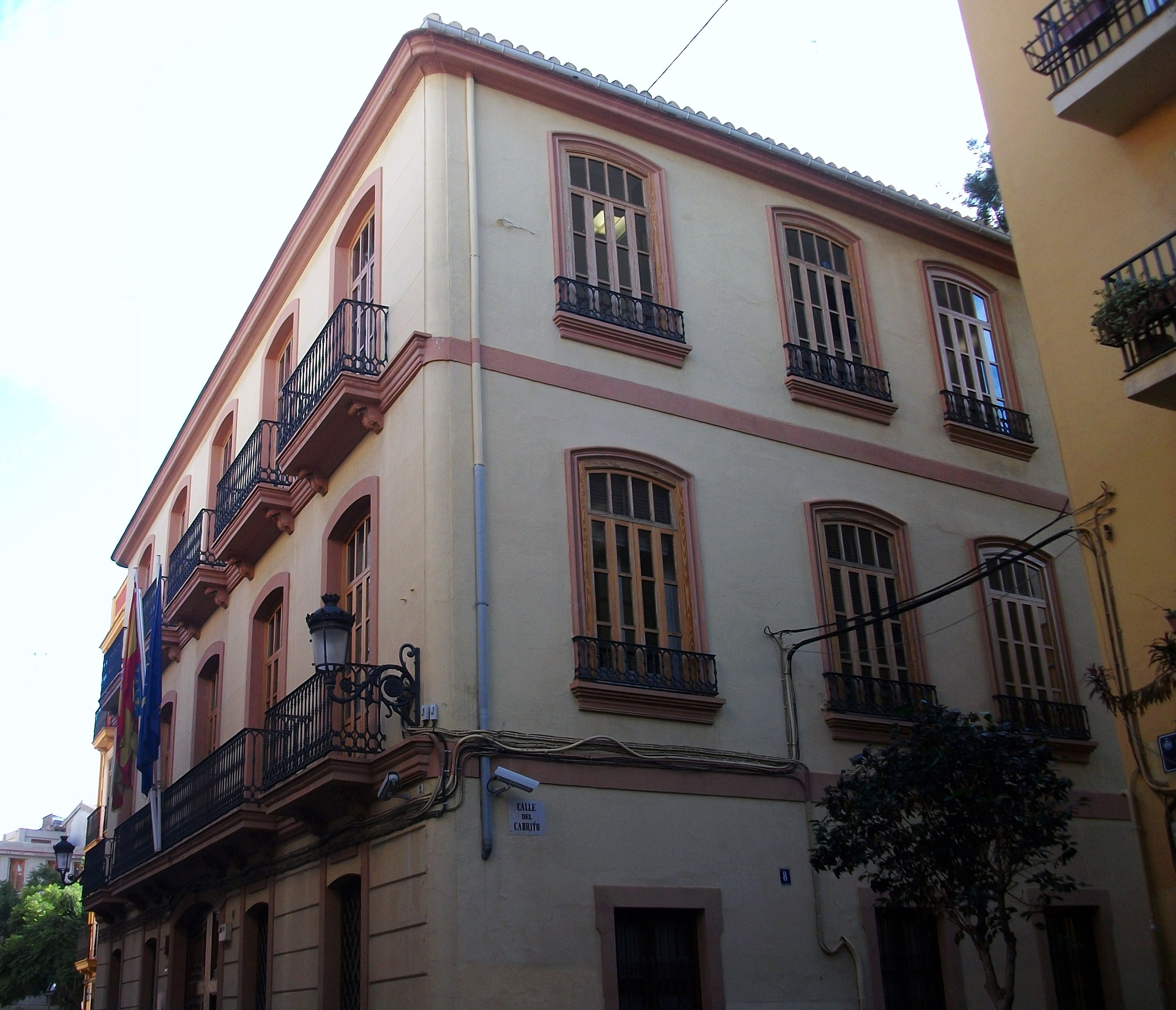 Palau de Forcalló, seu del Consell Valencià de Cultura al barri del Carme de València.